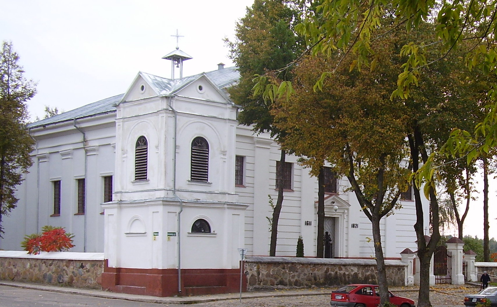 Paveiksle vaizuojama Leipalingio Švč. Mergelės Marijos Ėmimo Dangun bažnyčios varpinė ir pati bažnyčia, matoma už jos